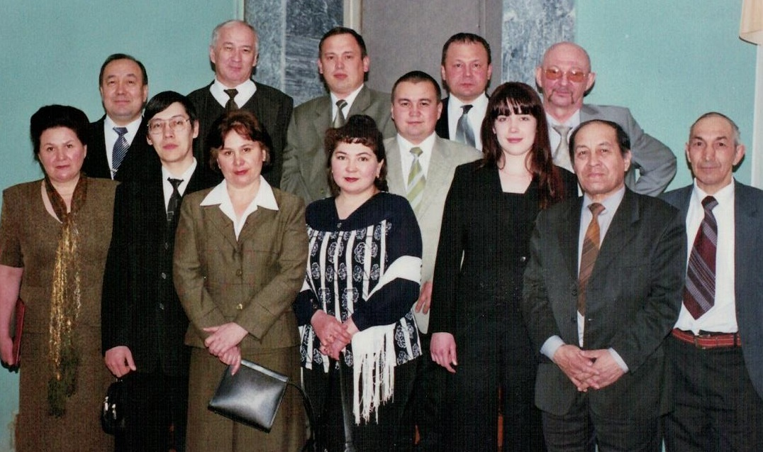 Белорет районы шәхестәре. 1996